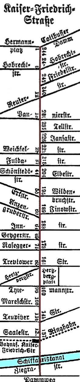 Straßenbild Kaiser Friedrichstraße 1926